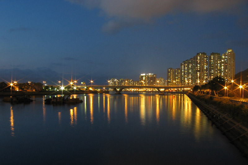 中文（香港）: 城門河夜景。